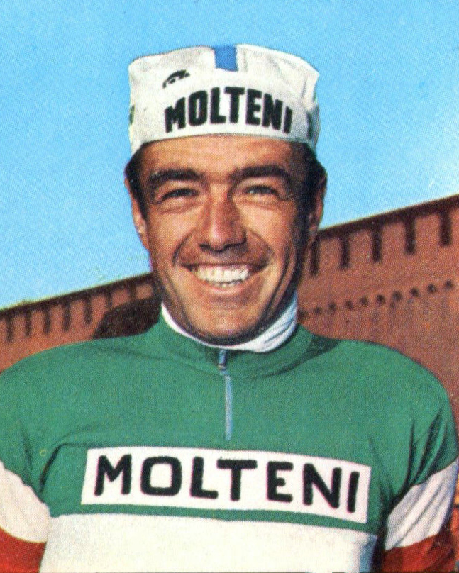 Figurina/Sticker CAMPIONI DELLO SPORT 1968/69 - n. 161 - F. BALMAMION -ITA-New